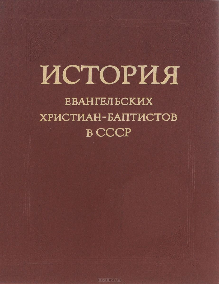 Обложка книги "История ЕХБ в СССР", Москва, изд-во ВСЕХБ, 1989